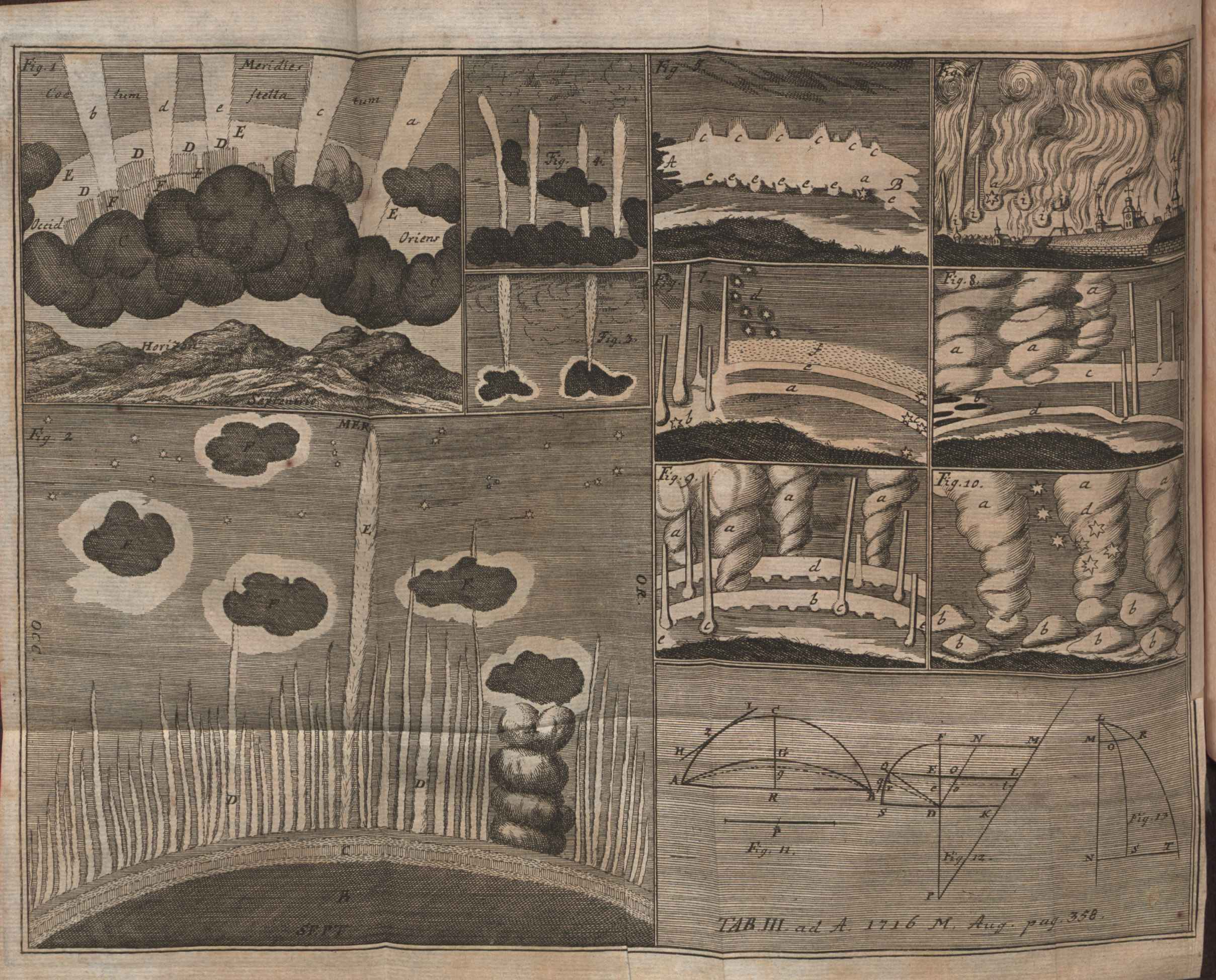 Illustration